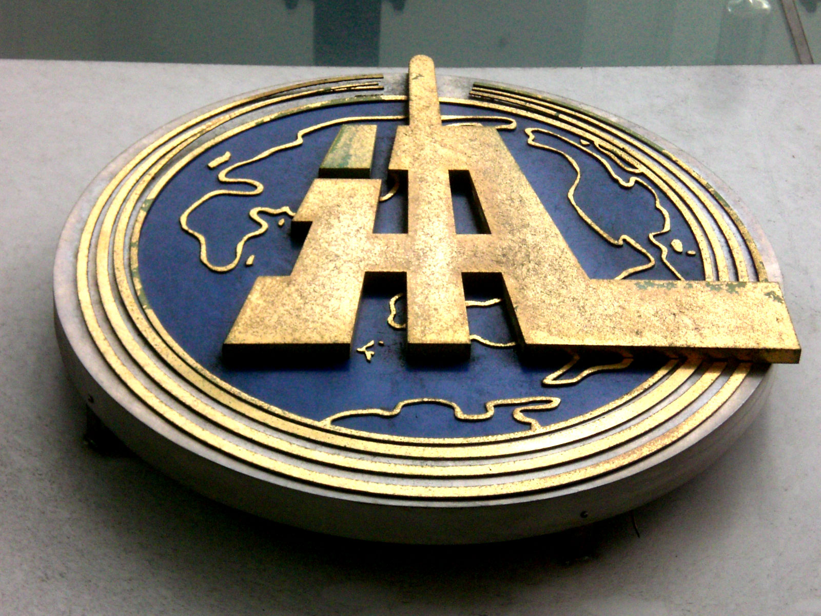 中文（香港）: 新華通訊社香港分社, 灣仔皇后大道東